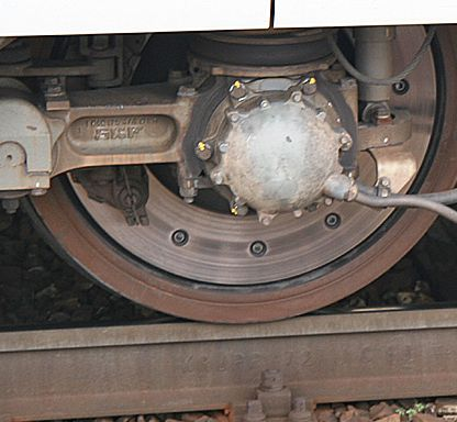 Wegimpulsgenerator am ICE 3MF